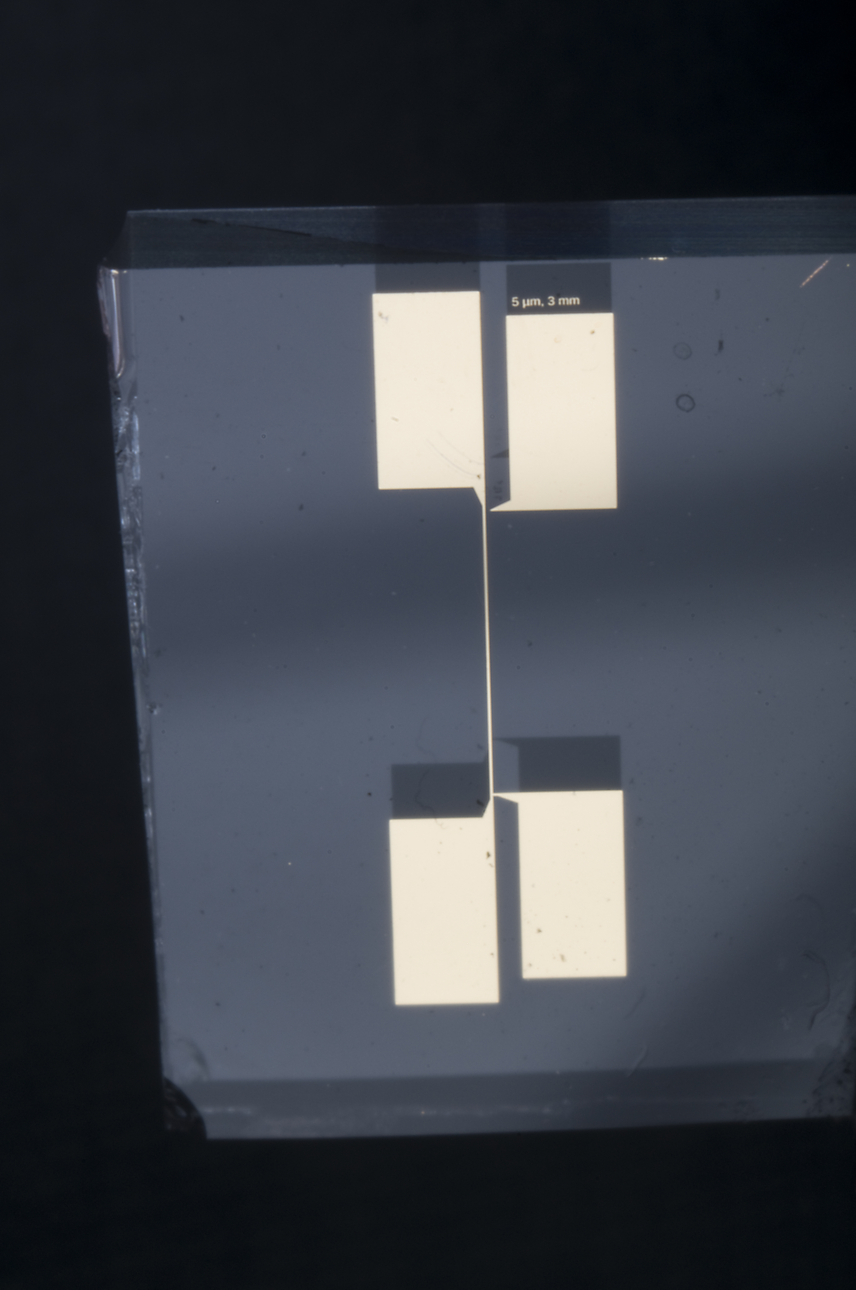 auf Glas aufgedampfter Metalldraht für 3-Omega-Messungen.